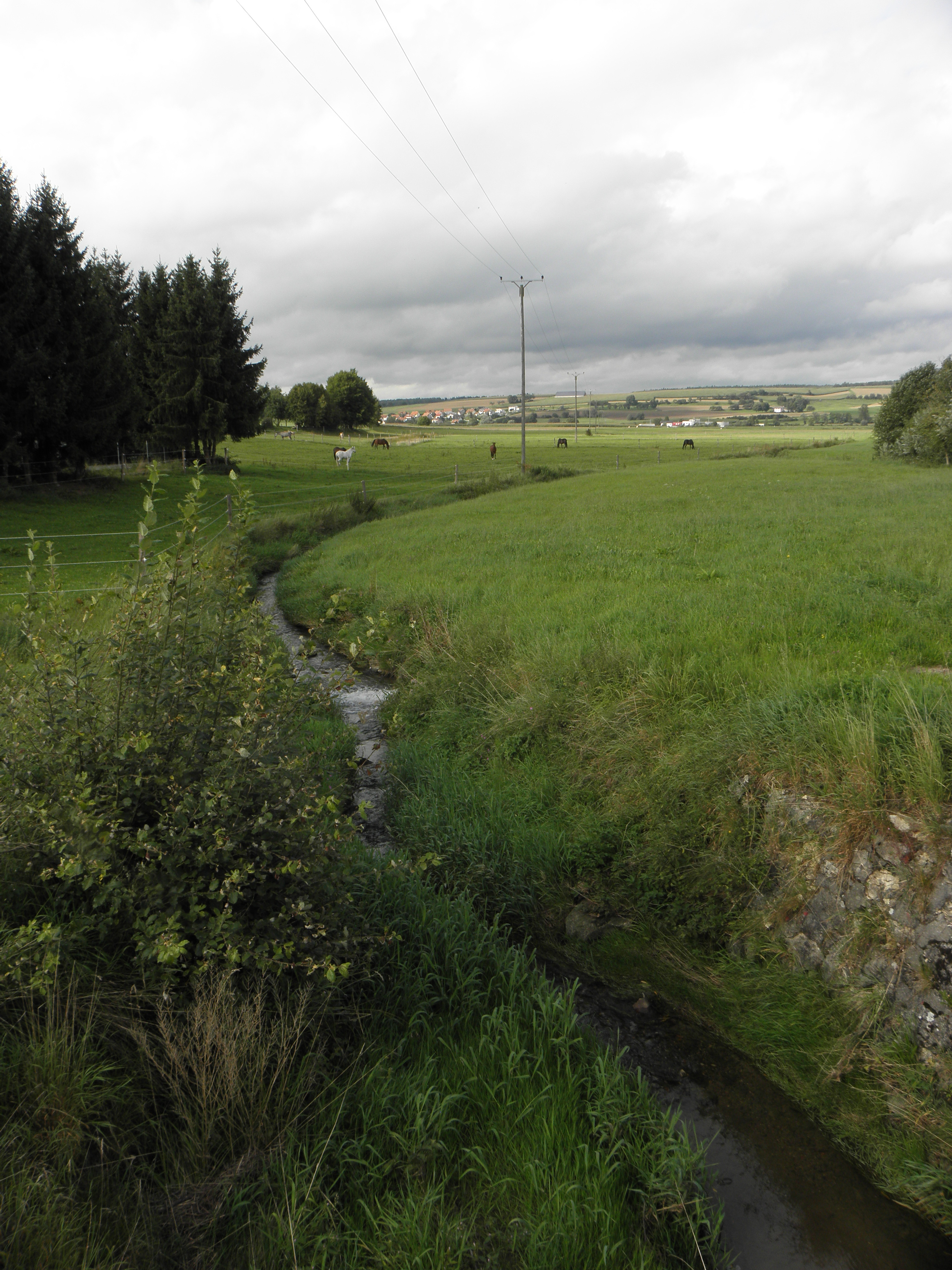 Der Ringenbach verlässt das Dorf Ringgenbach und tritt ins Tal der Ablach ein.